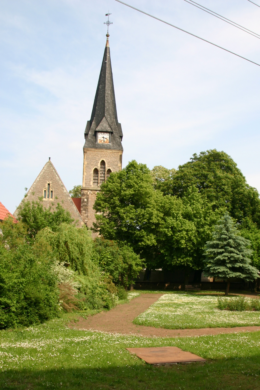 Maasdorf ist ein Ortsteil der Stadt Südliches Anhalt in Sachsen-Anhalt, Deutschland.